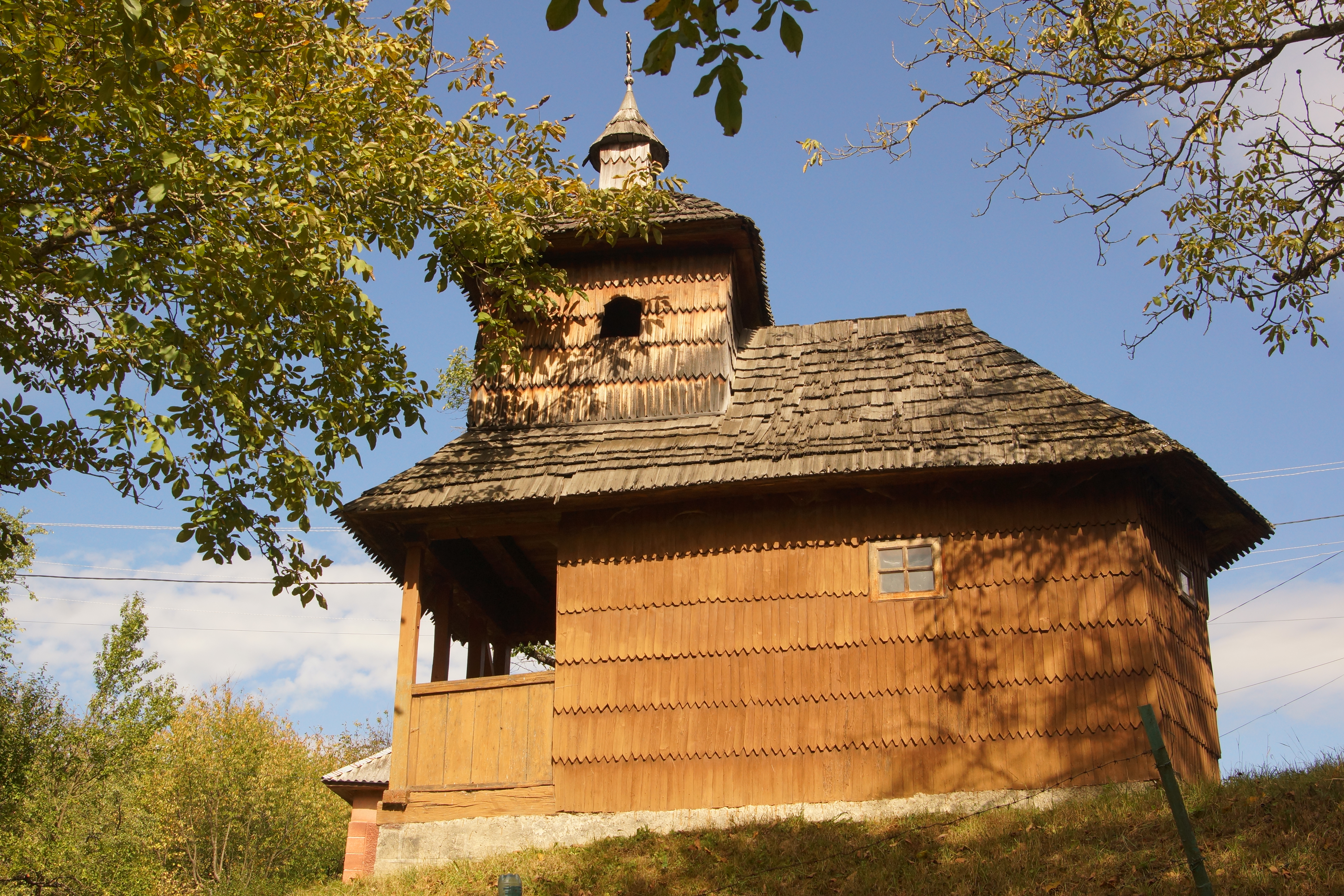 Церква Святих апостолів Петра і Павла (дер.), с. Уклин